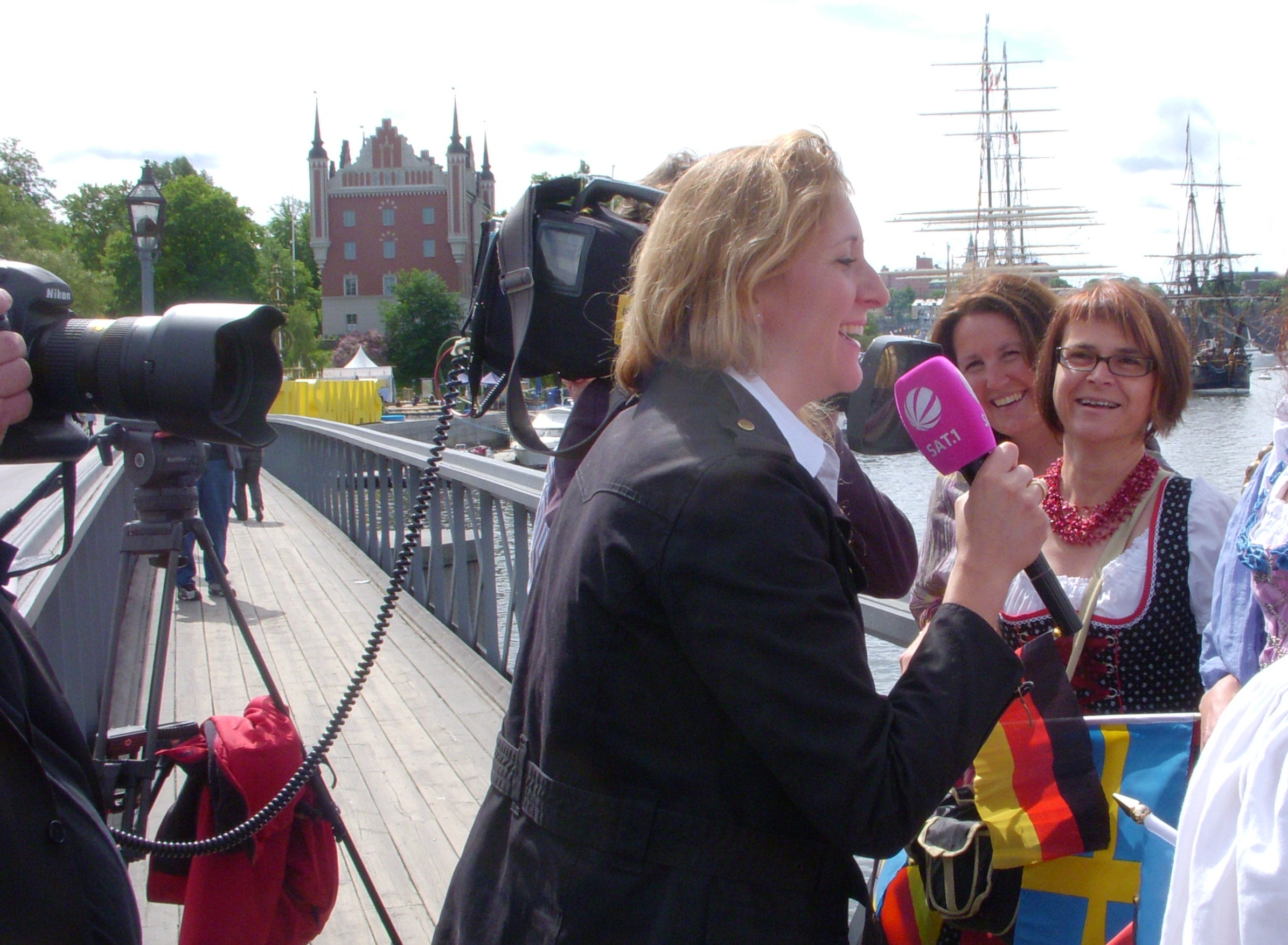 Sat.1 sänder från kungliga bröllopet 19 juni 2010